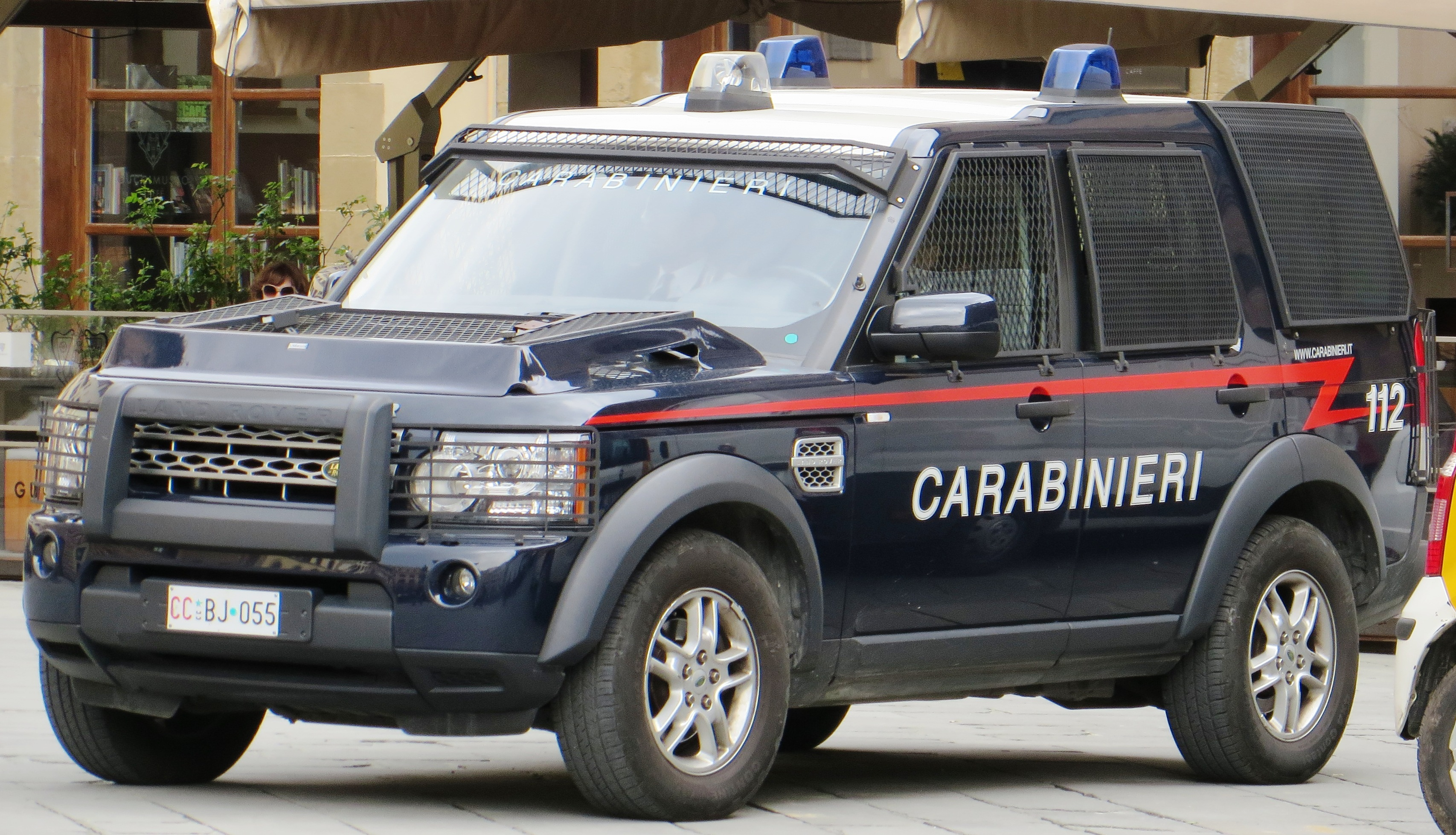 Carabinieri